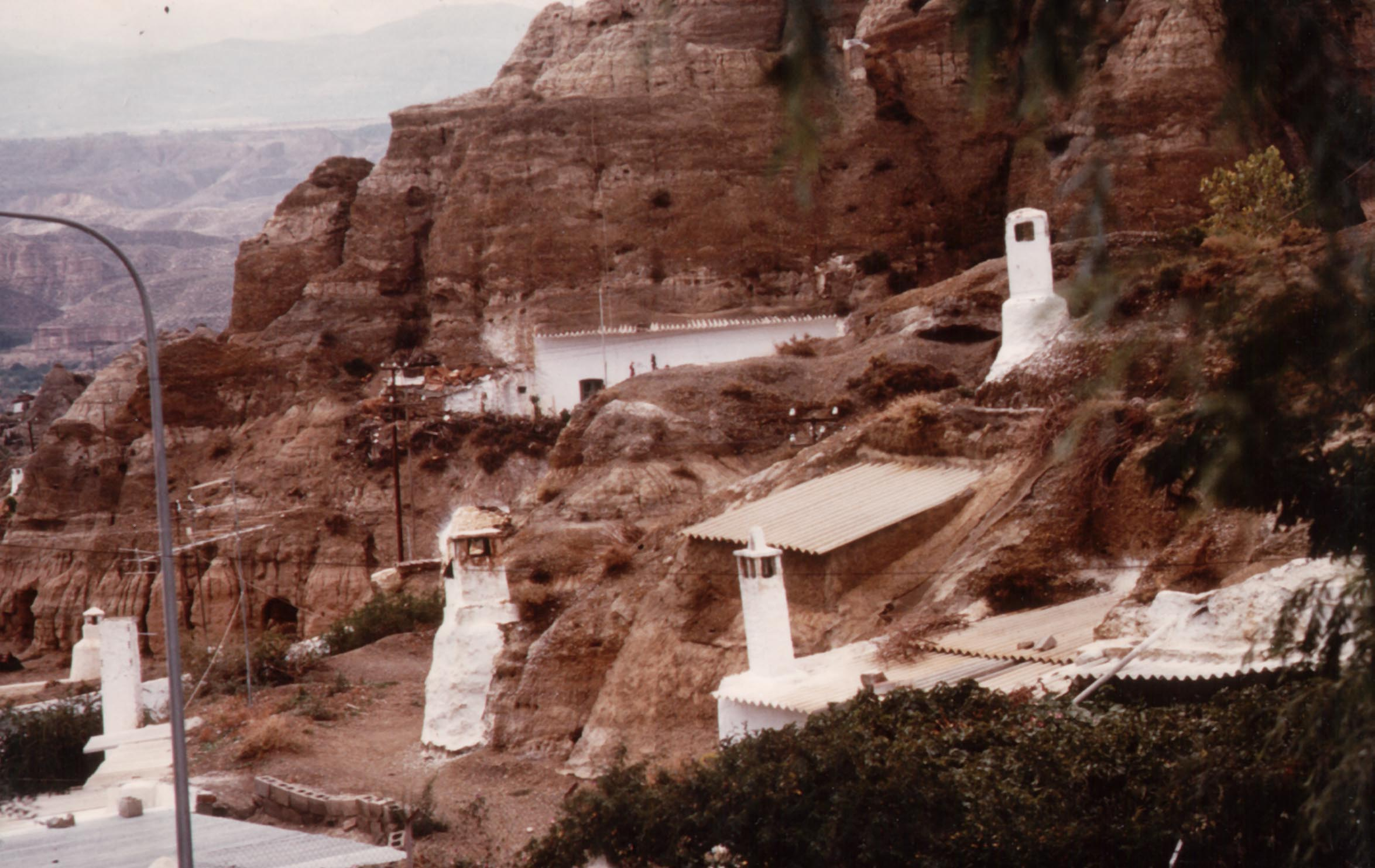 Höhlenwohnungen bei Guadix Datum: 10/1986 Urheber: selbst erstelltes Privatfoto / Michael Pfeiffer Quelle: Bildarchiv der Familie